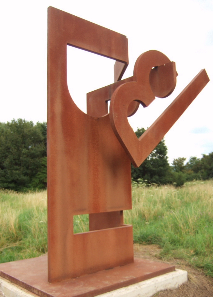 Reinhard Puch : Akkord I (2005) – seit 2007 in Bonn-Limperich auf dem Finkenberg – Material: COR-TEN-Stahl – Höhe: 2,60 Meter